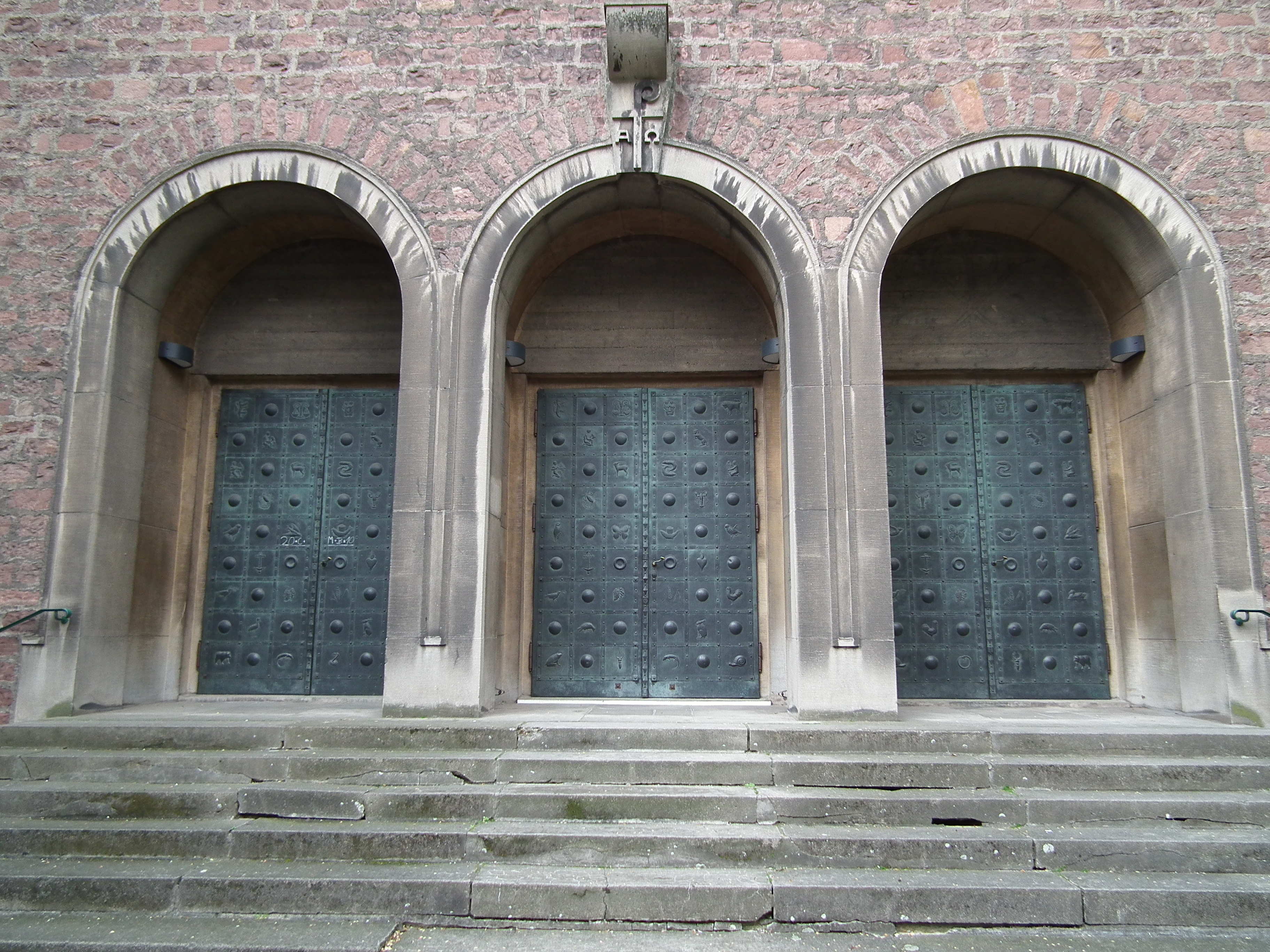 Türen am Portal der katholischen Kirche St. Albert im Heidelberger Stadtteil Bergheim (Baden-Württemberg, Deutschland)